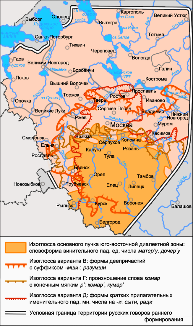 Карта вариантов В, Г и Д основного пучка изоглосс юго-восточной диалектной зоны русского языка. Источники: Захарова К. Ф., Орлова В. Г. Диалектное членение русского языка — 2-е изд. — М.: Едиториал УРСС, 2004. — ISBN 5-354-00917-0, с. 103—104.